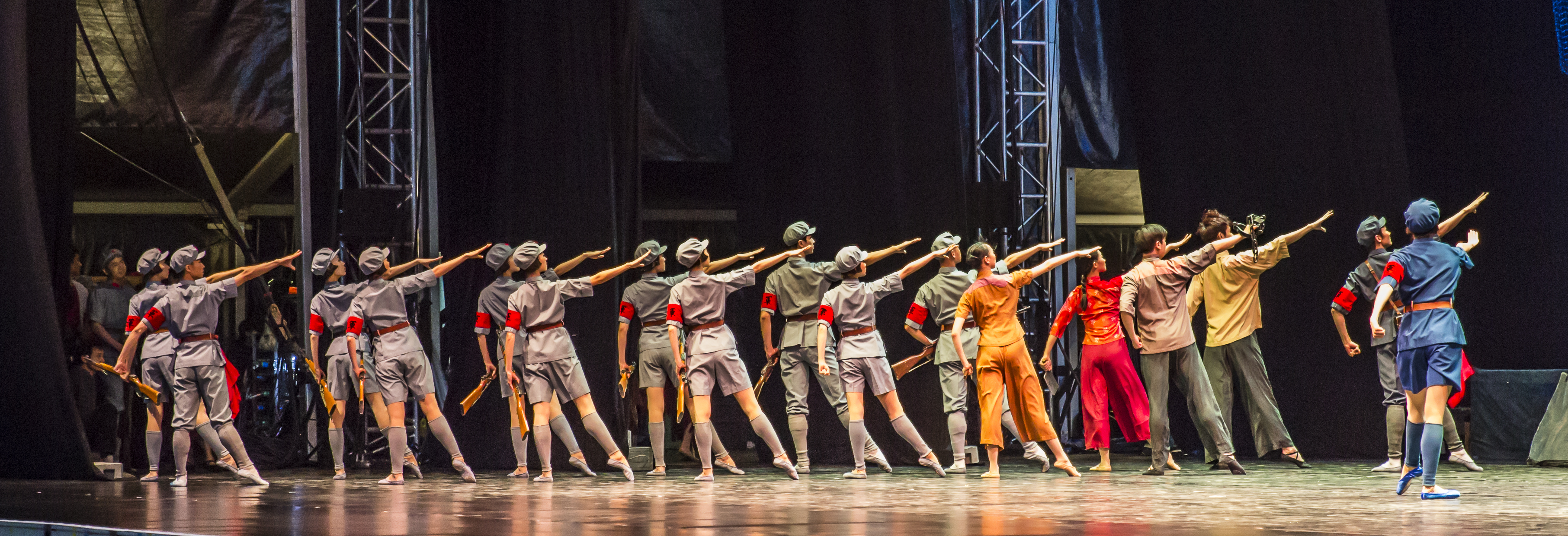 Helsingin juhlaviikot, Helsinki Festival, China Central Ballet Troupe